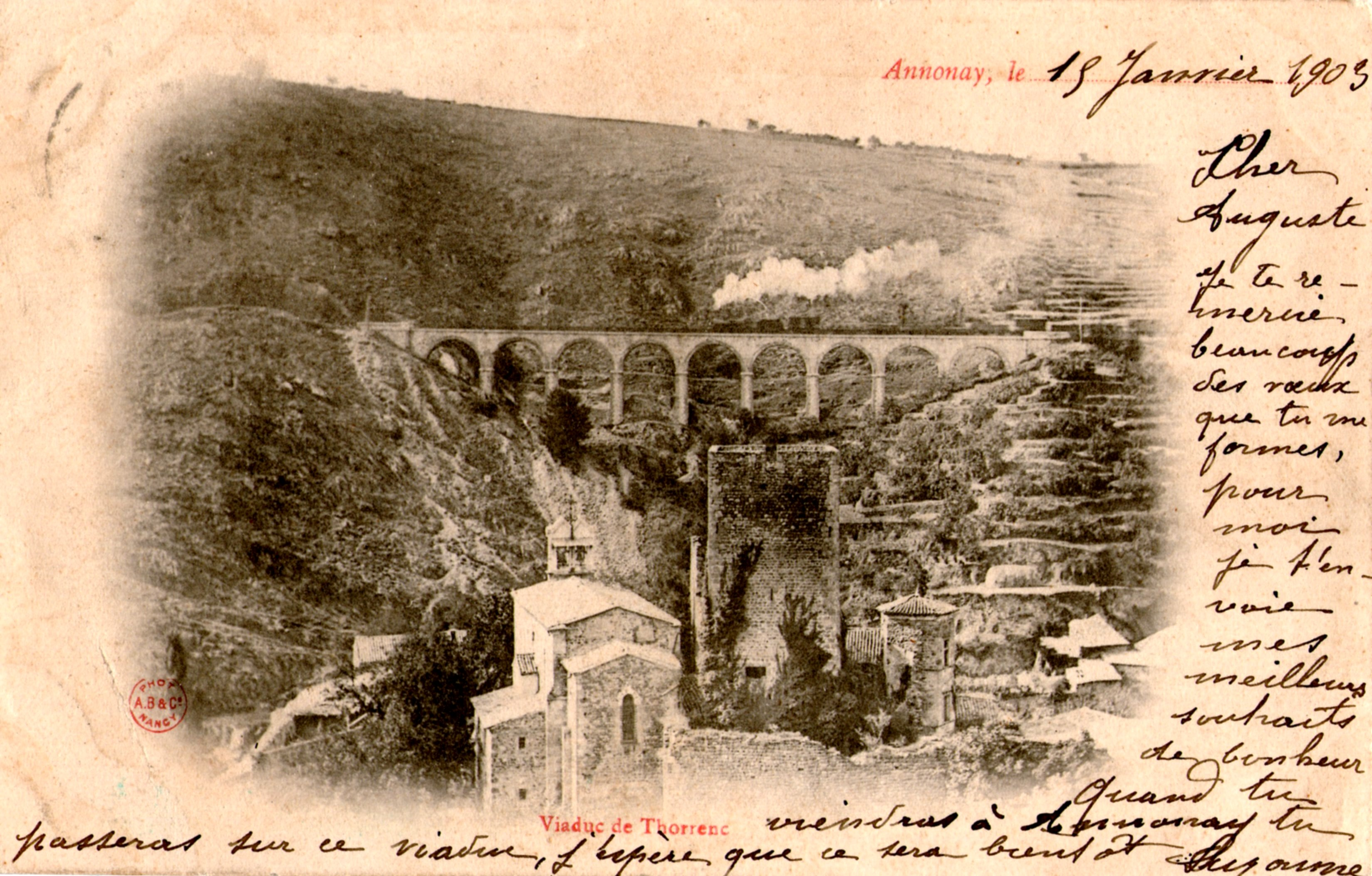 Thorrenc postcard train and castle